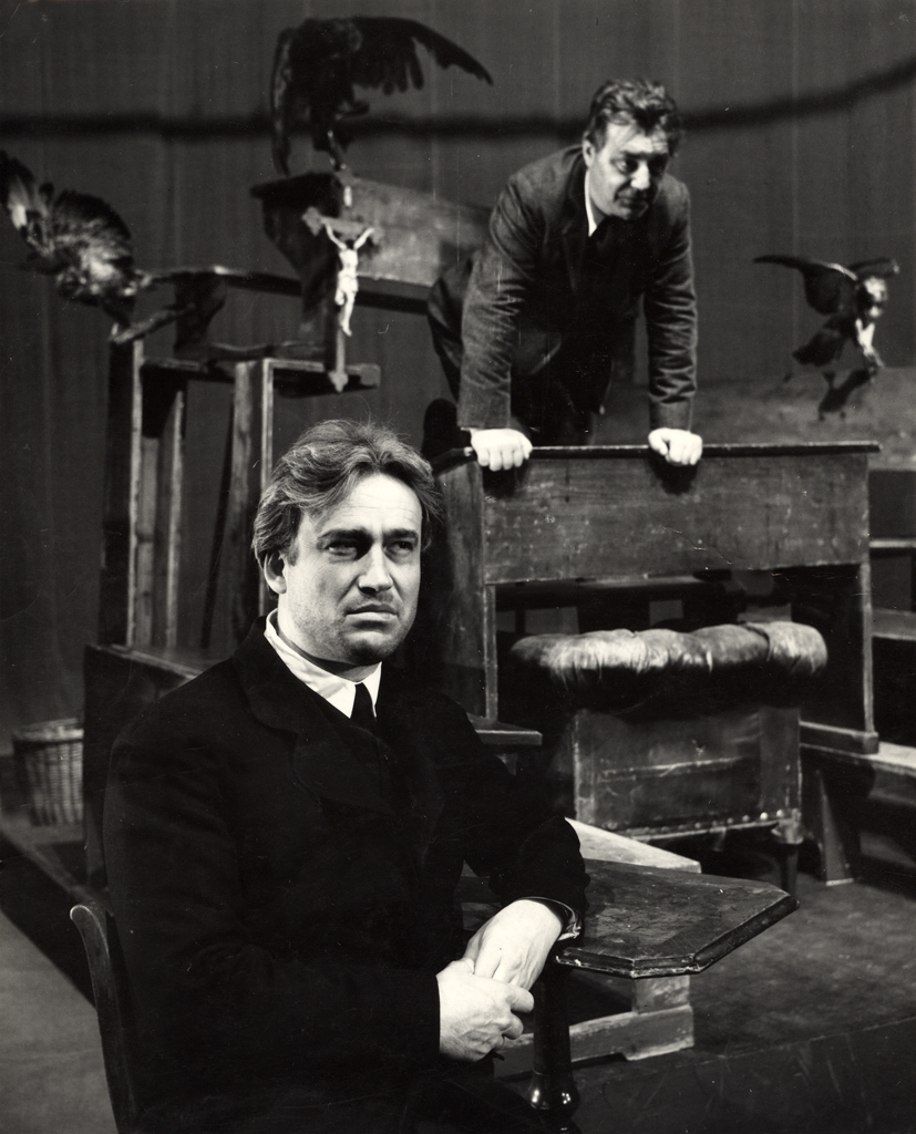 Ivan Cankar, Hlapci, Slovensko ljudsko gledališče Celje. Na fotografiji: Aleksander Krošl (Hvastja), Pavle Jeršin (Komar).